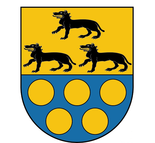 Armas: en campo de oro, tres lobos de sable, puestos uno y dos; cortado de azur, con cinco bezantes, de oro, puestos tres y dos.